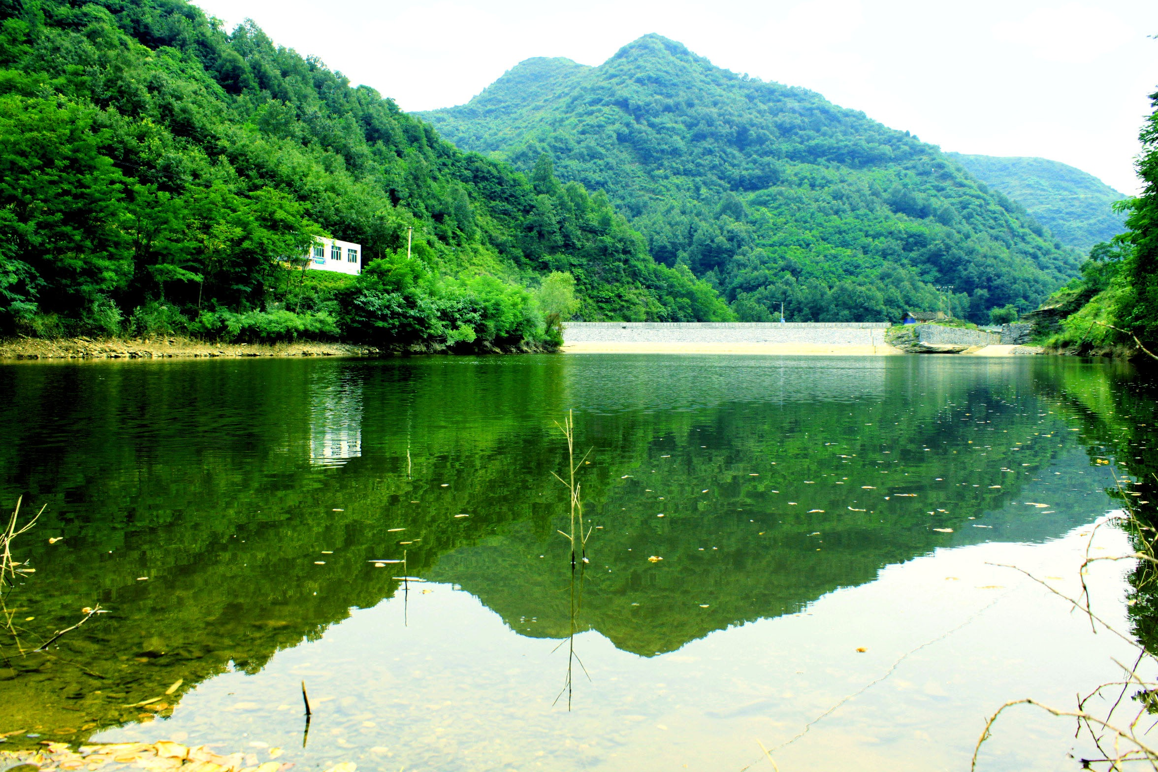 陆家沟水库